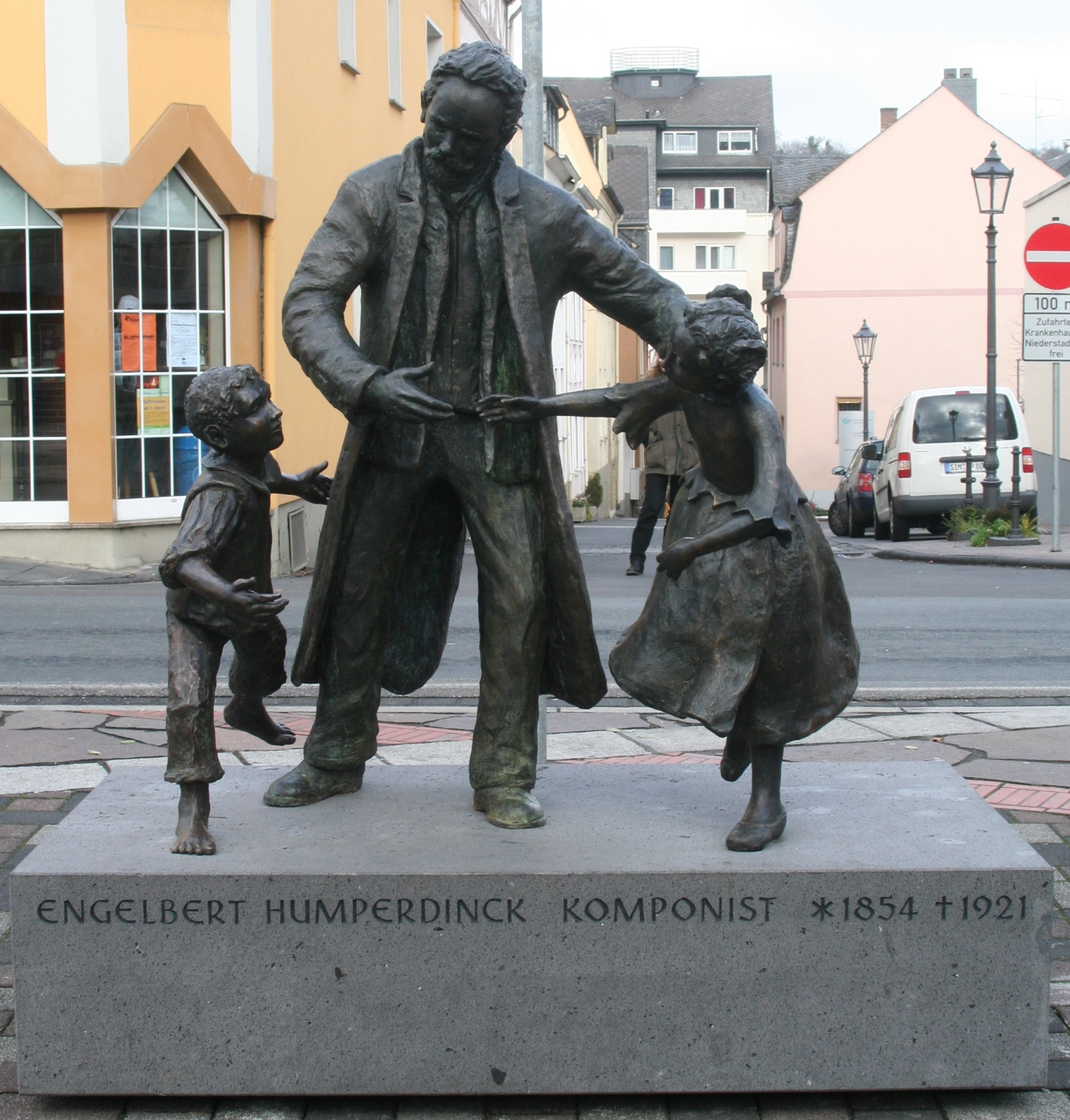 Bronze Plastikengruppe von Jutta Reiss in Boppard